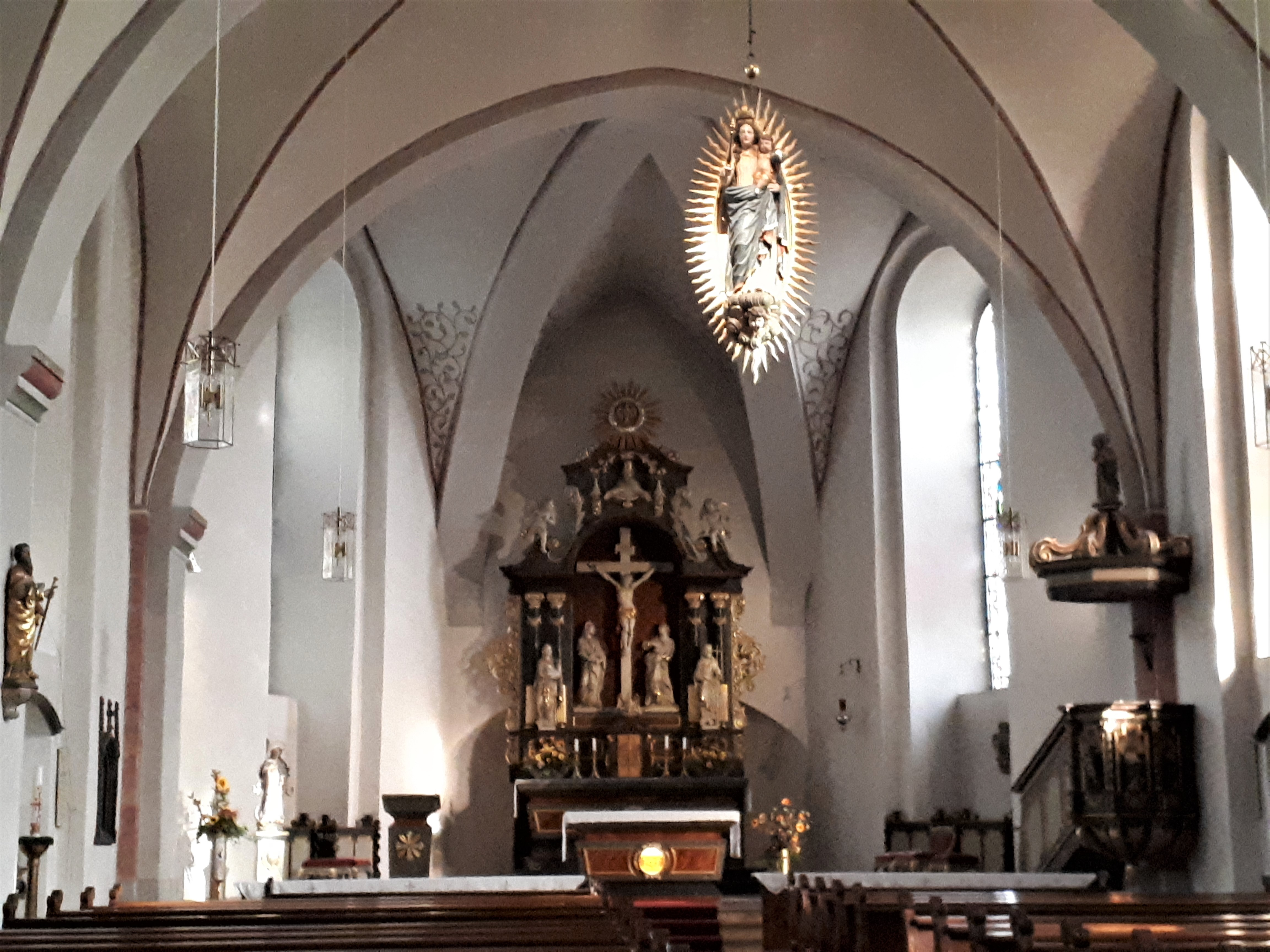 Katholische Pfarrkirche Sankt Peter und Paul in Eslohe